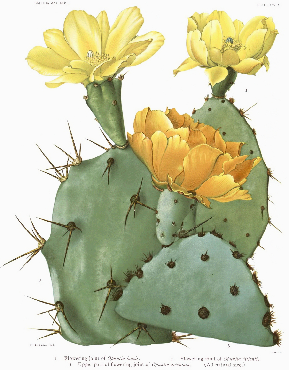 1. Opuntia laevis, 2. Opuntia dillenii, 3. Opuntia aciculata.